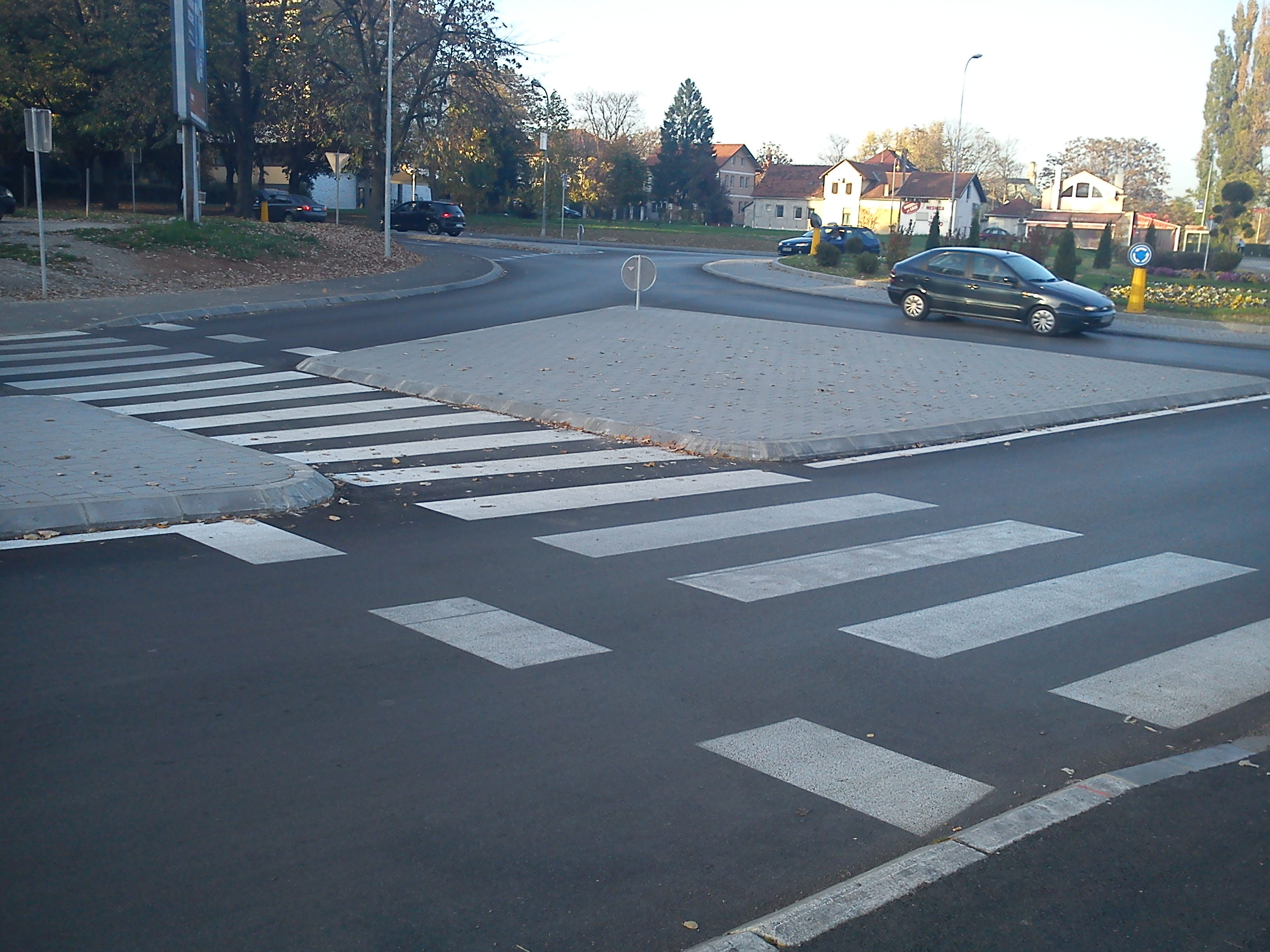 Кружни ток, МЗ Булевар БЛ